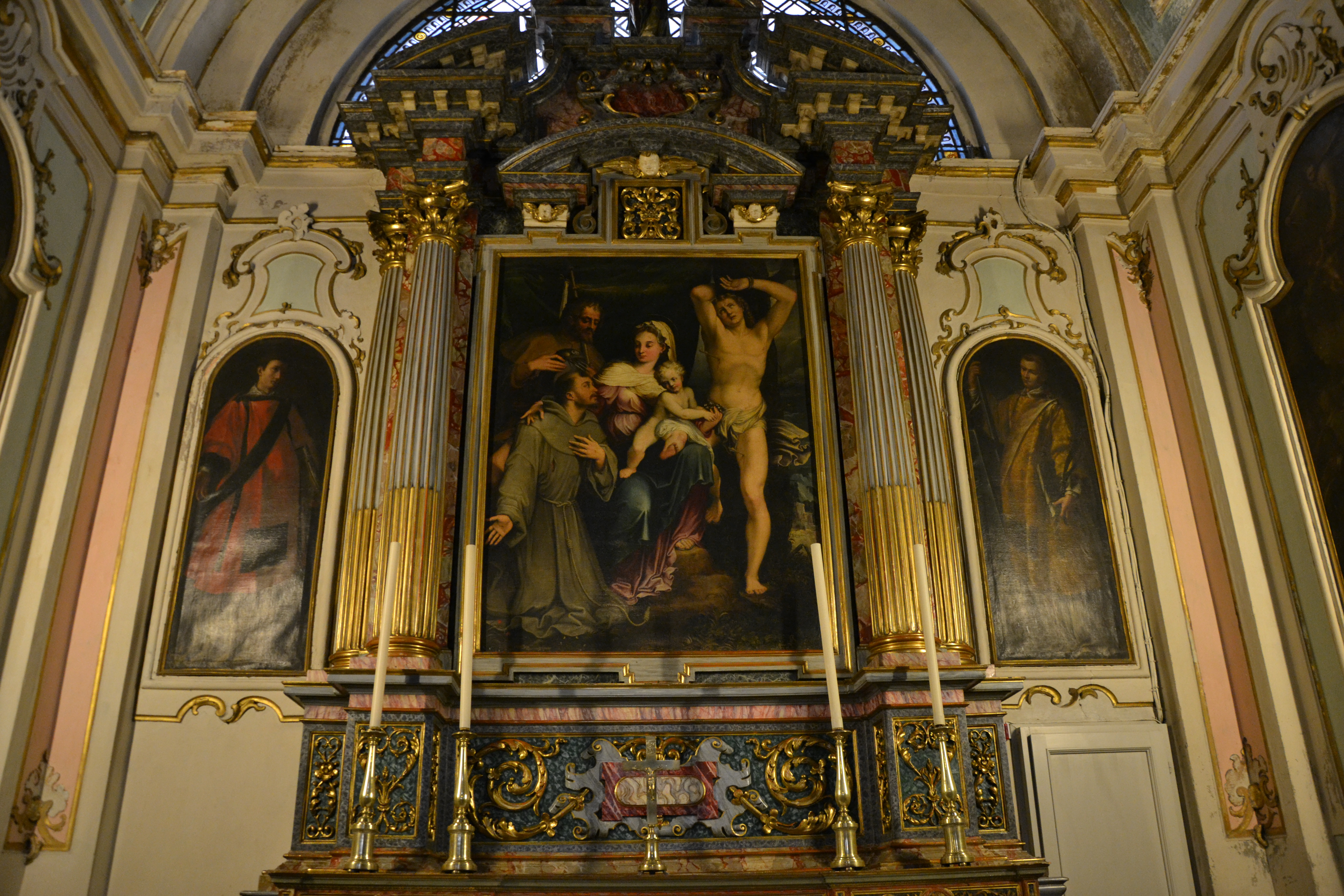 Chiesa dei Santi Fermo e Rustico (Caravaggio)